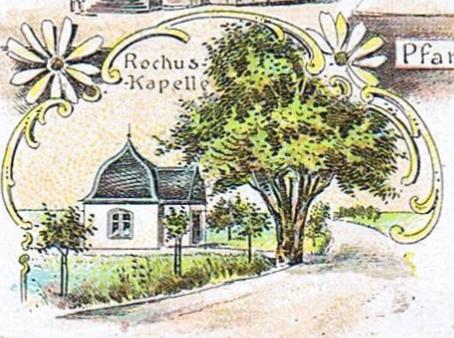 Alte Rochuskapelle in Offheim mit Linde um 1900